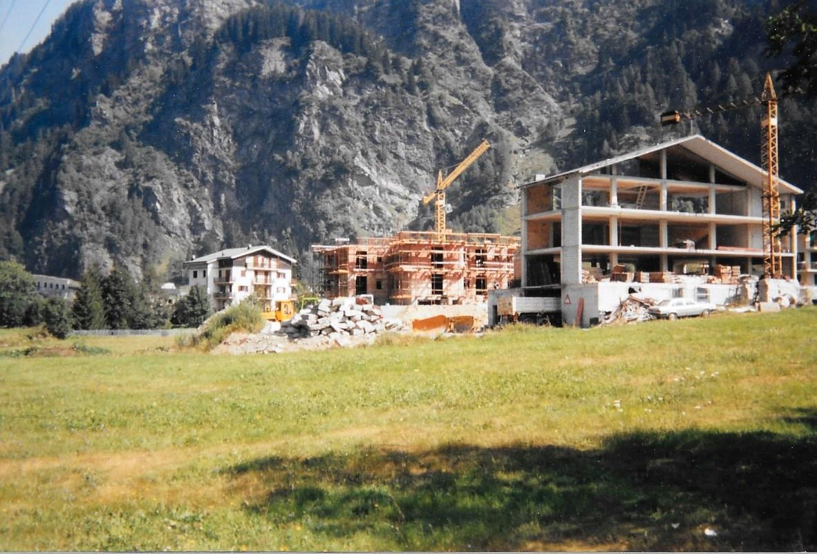 Cantieri a Campodolcino negli anni '90